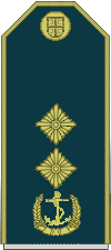 Serbian military ranks and insignia